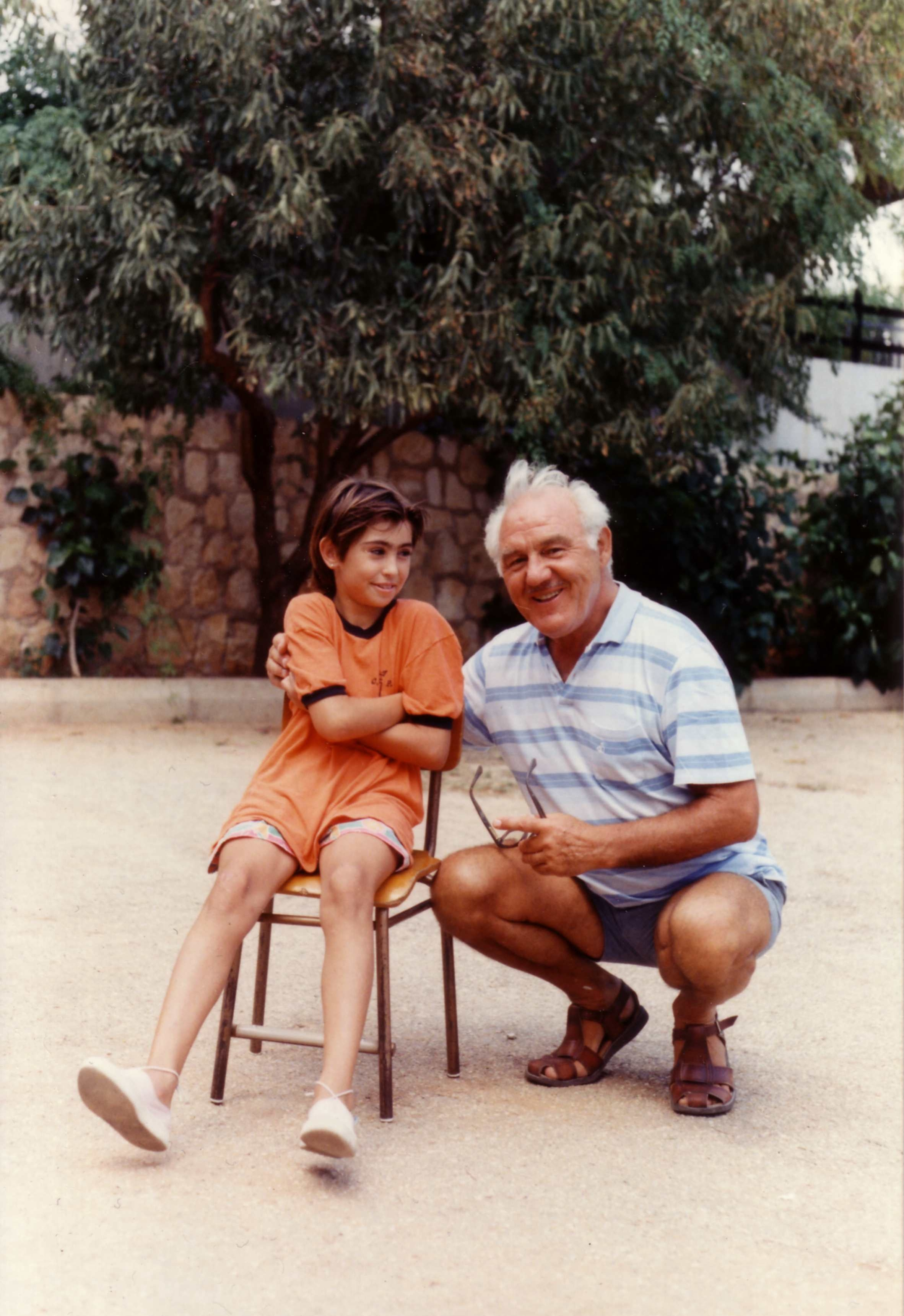 El contrabajista Ludwig Streicher junto a la hija del conserje de la escuela pública en la que realizó dos curso de contrabajo. Xàbia (Alicante, España), agosto de 1988.